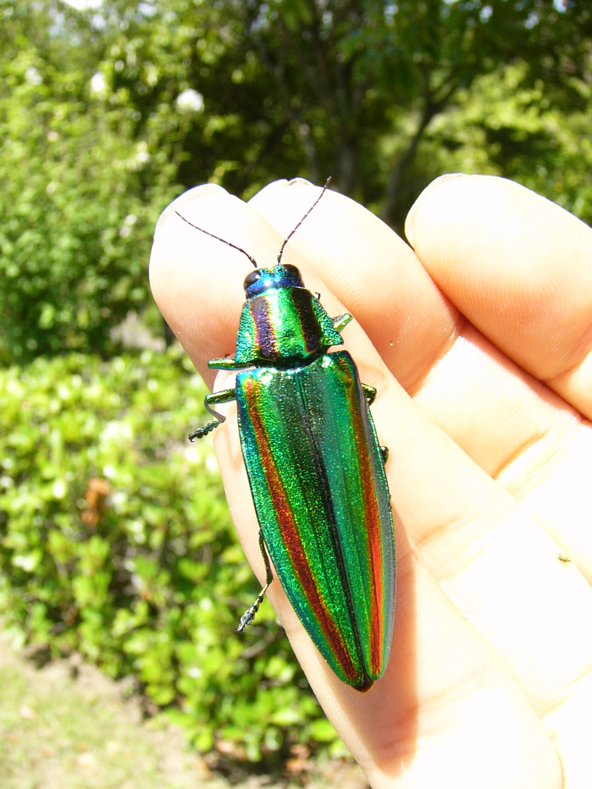 2013年8月4日愛知県知多郡東浦町於大公園内にて撮影